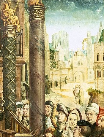 Retable d'Aix-la-Chapelle - Détail Volet gauche - vue de Cologne